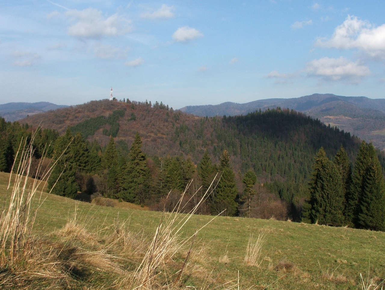 Jarmuta, Matwijowa Przełęcz, Czuprana (Małe Pieniny)